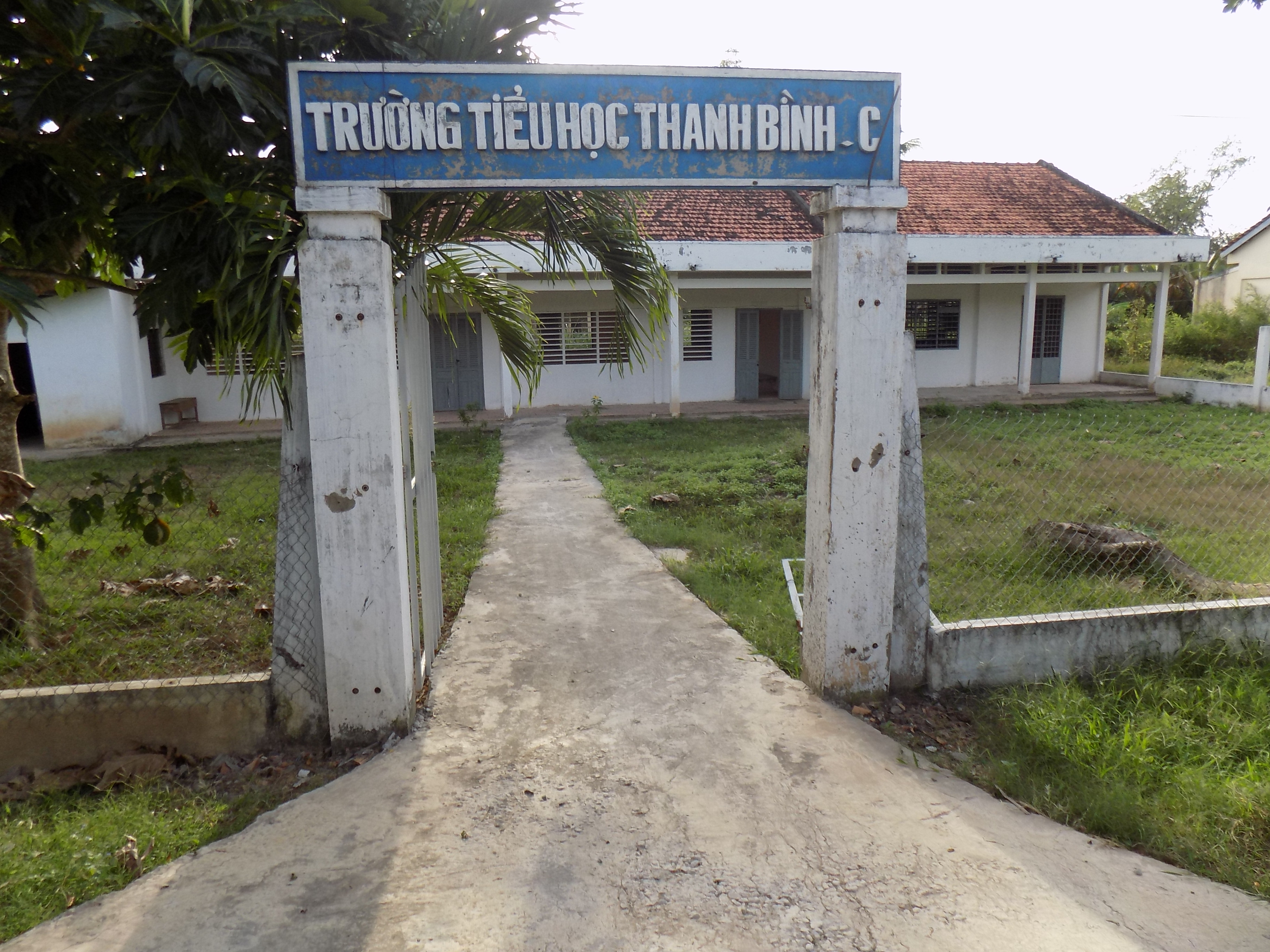 École élémentaire de Thanh Bình, Vũng Liêm